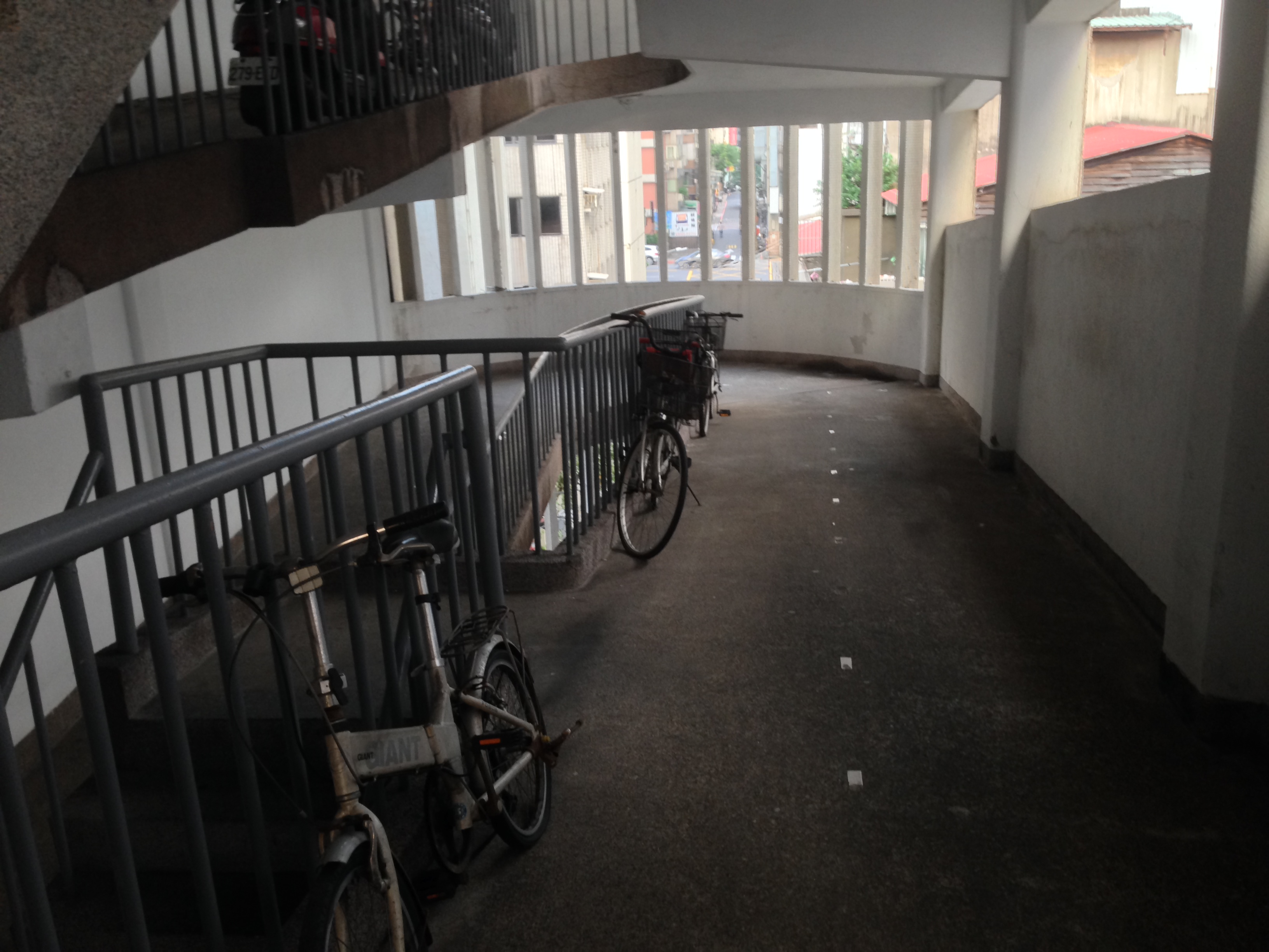 中文（台灣）: 吉林路機車道公寓機車塔內部